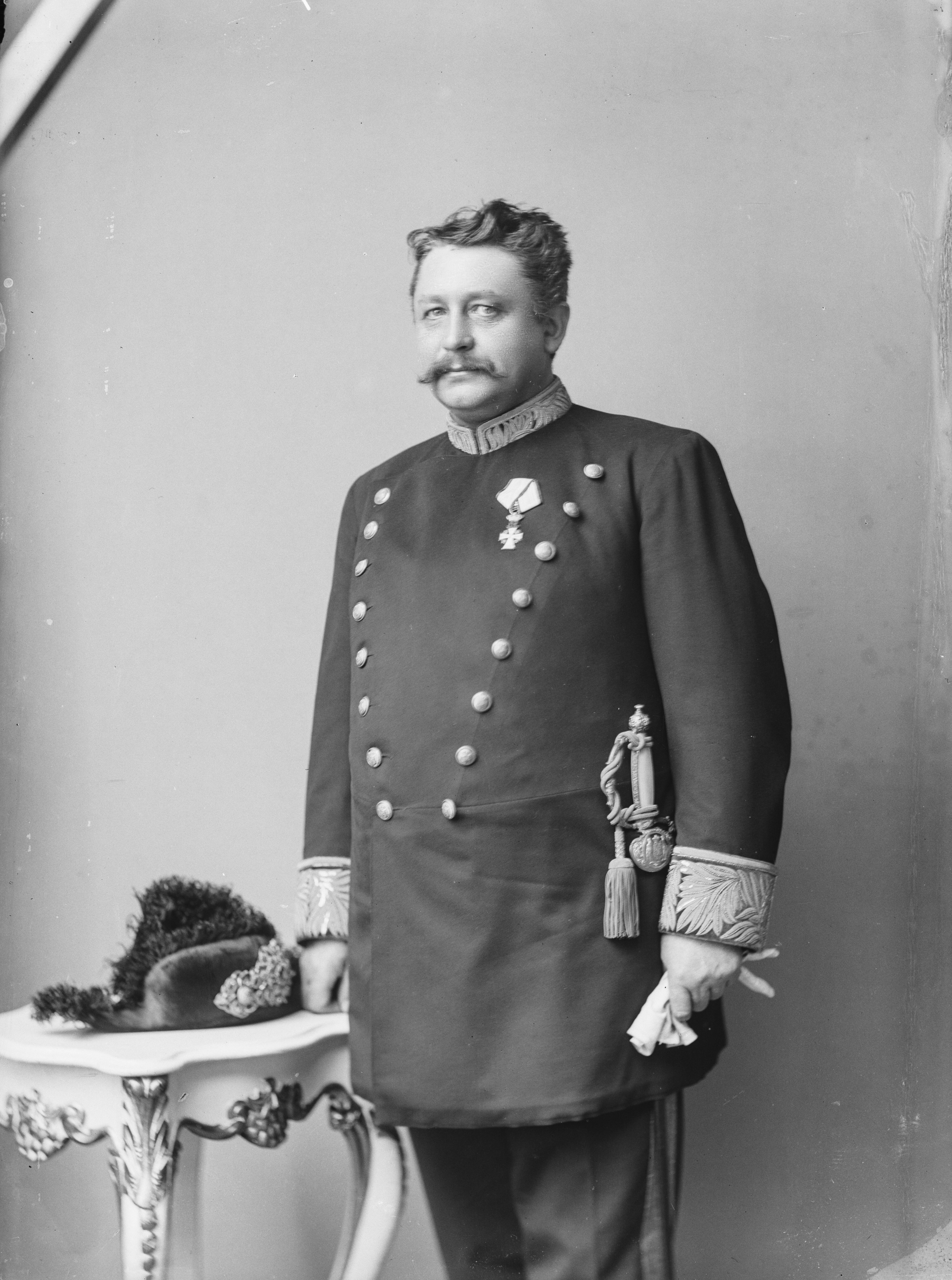 Hannes Hafstein (1861-1922). Erster Premierminister Islands (01.02.1904-31.03.1909)